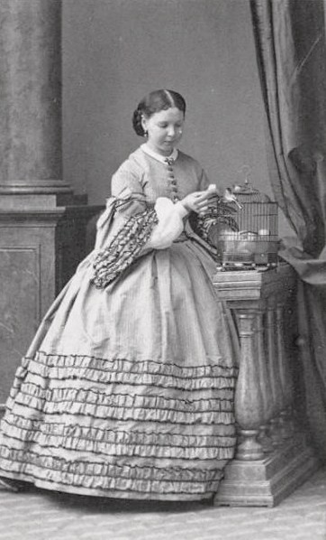 Александра Фёдоровна Грпббе, ур. Орлова-Денисова (1837—1892)